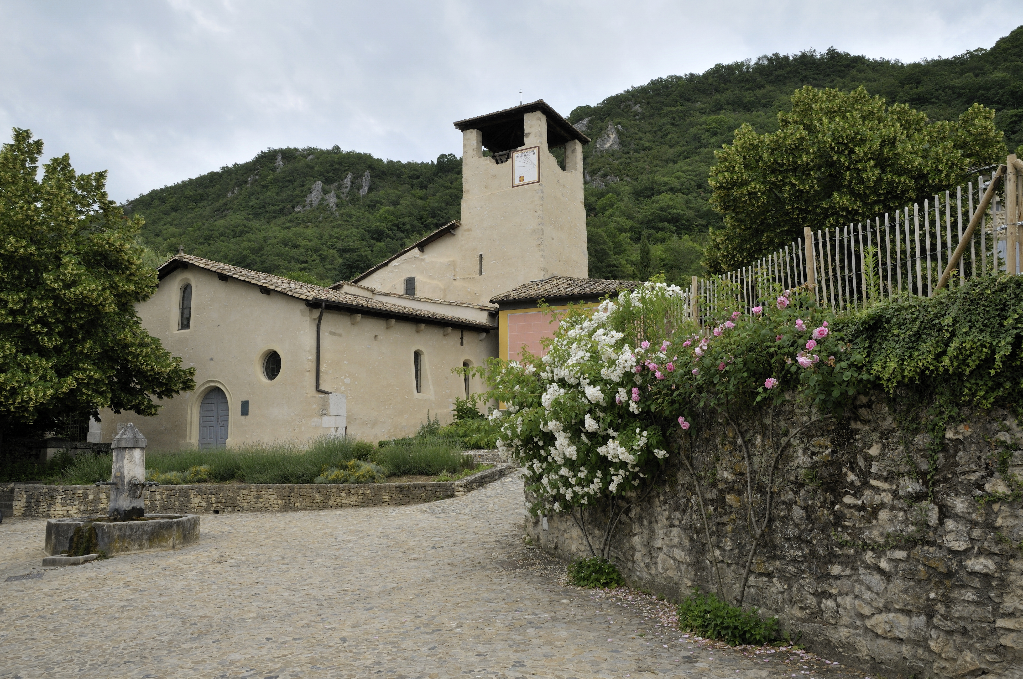 église du XIe siècle